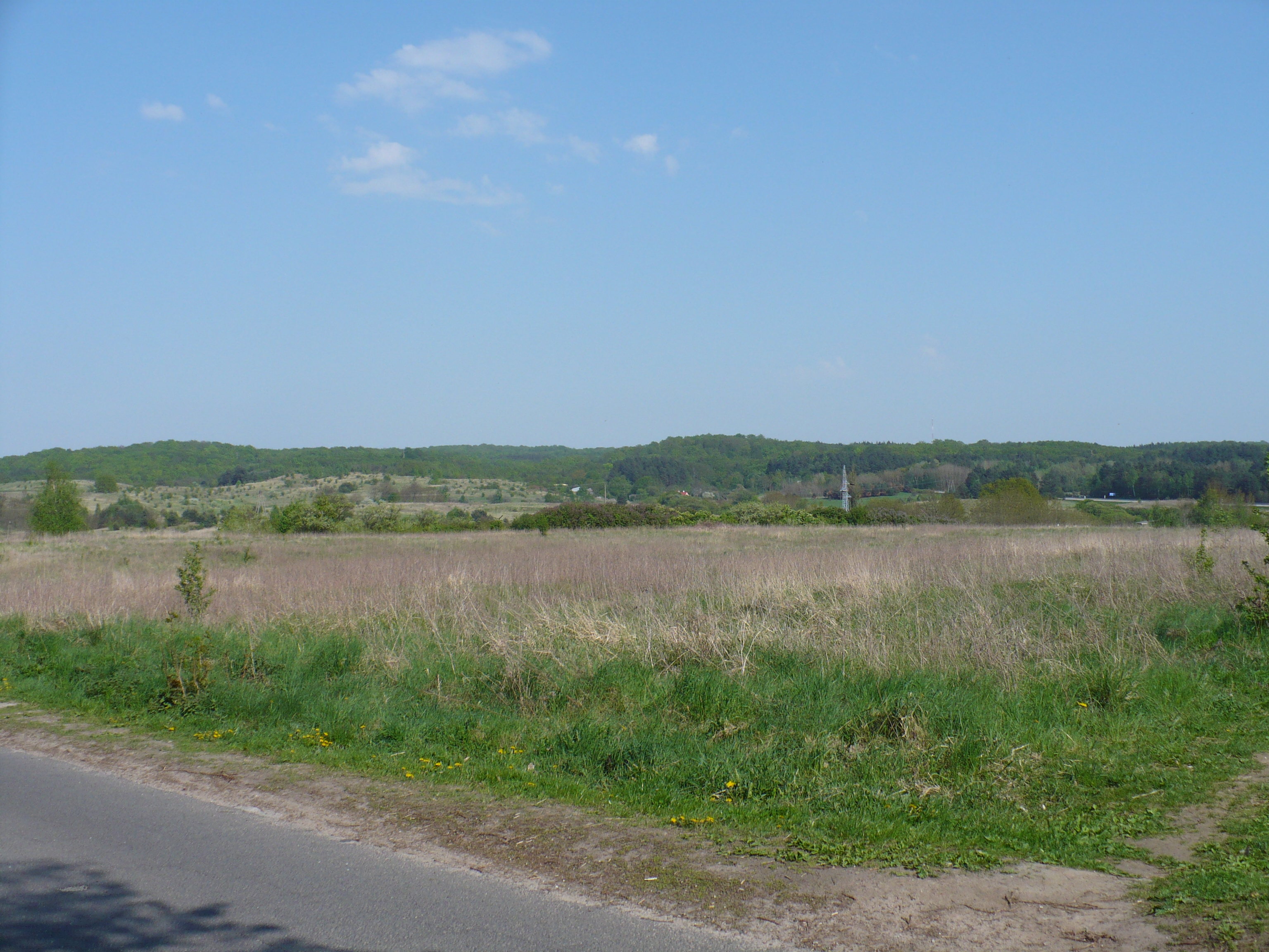 Puszcza Bukowa - widok z Klucza